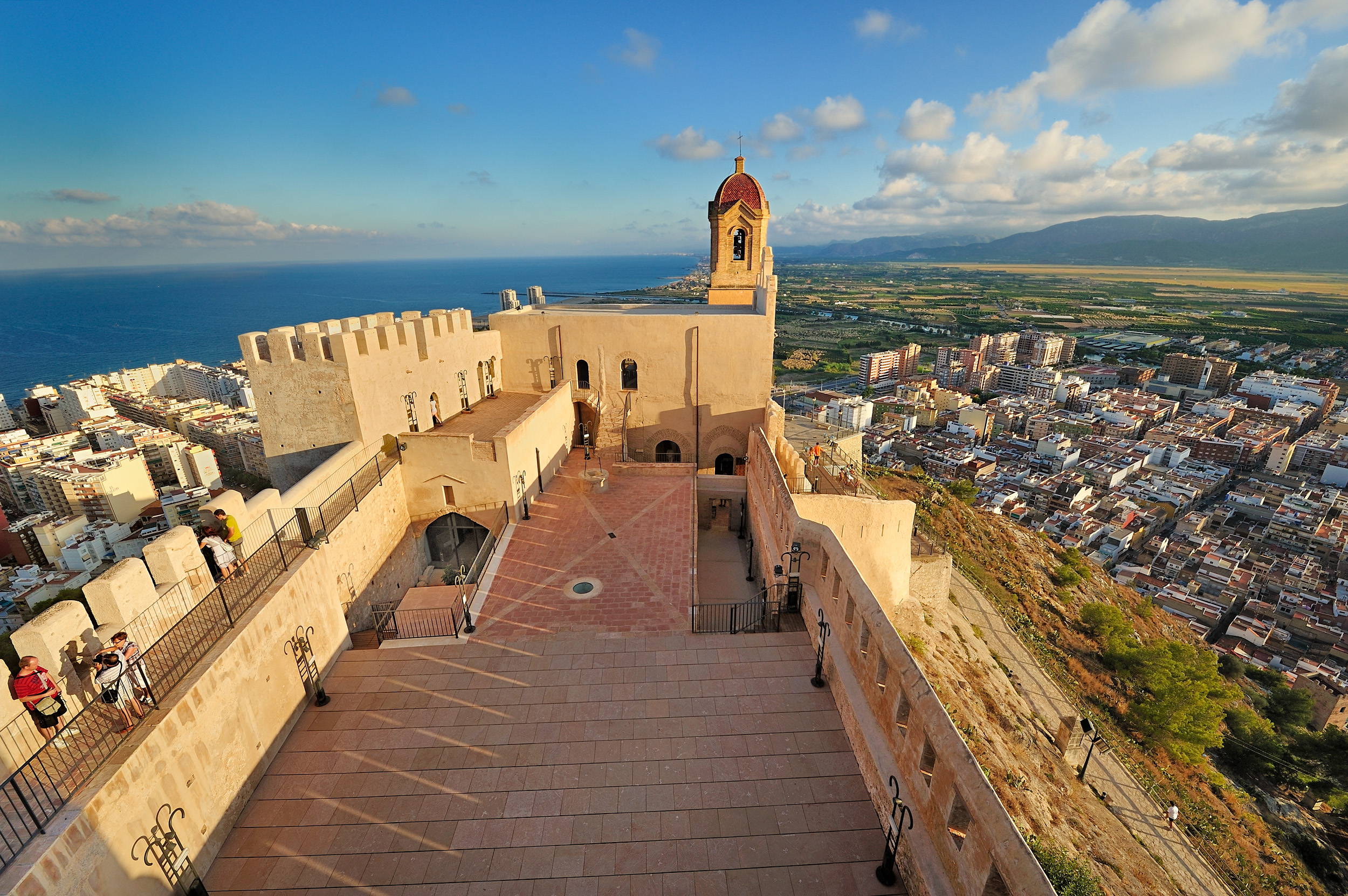 El Castillo de Cullera